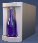 Frigogasatore - l'elettrodomestico per produrre l’acqua frizzante